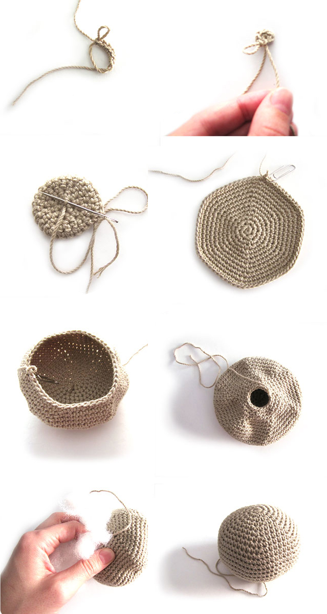 Paso a paso para crear amigurumis con la técnica de ganchillo en espiral